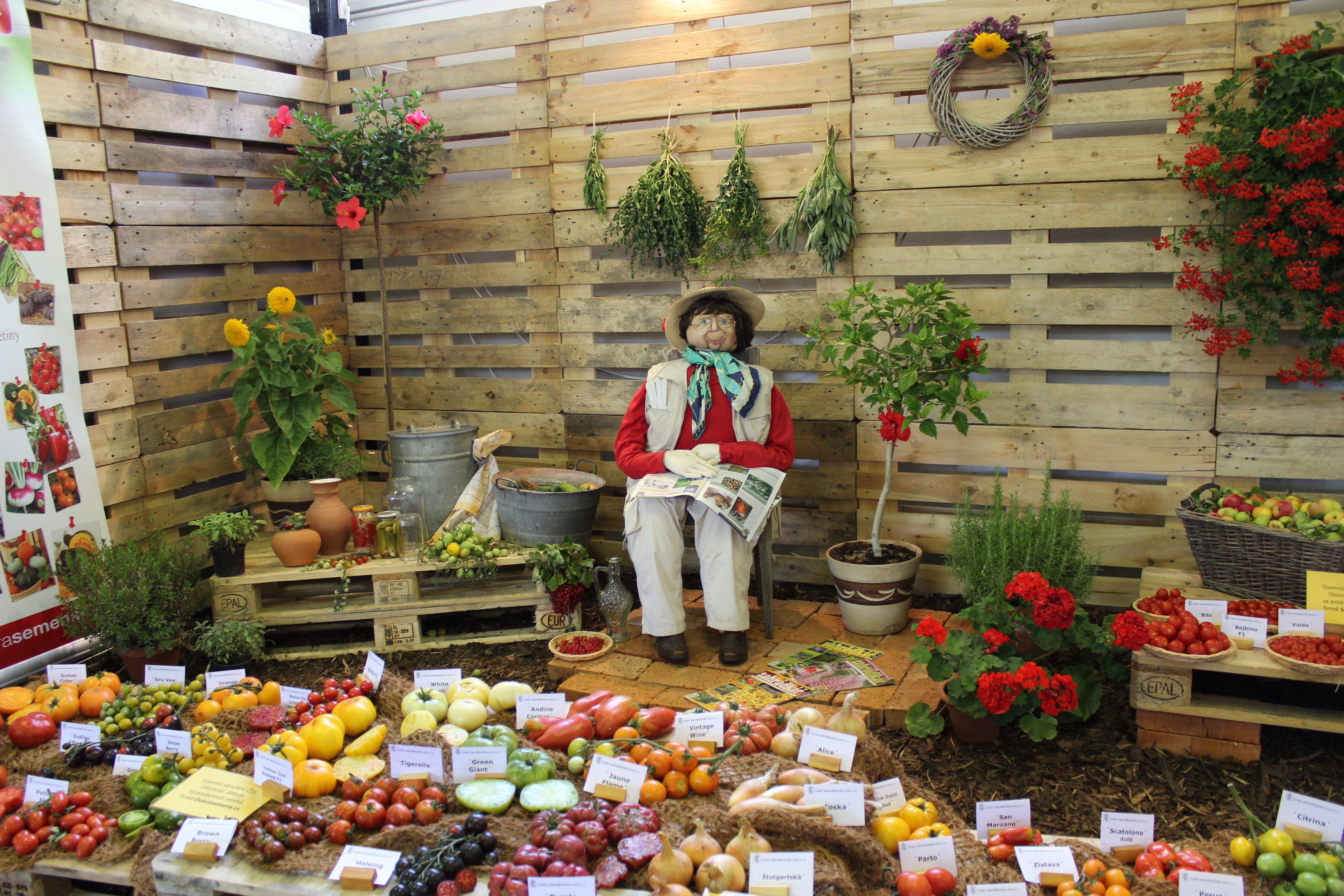 Vnitřní expozice květin, ovoce a zeleniny na výstavě Flora Olomouc 2013.